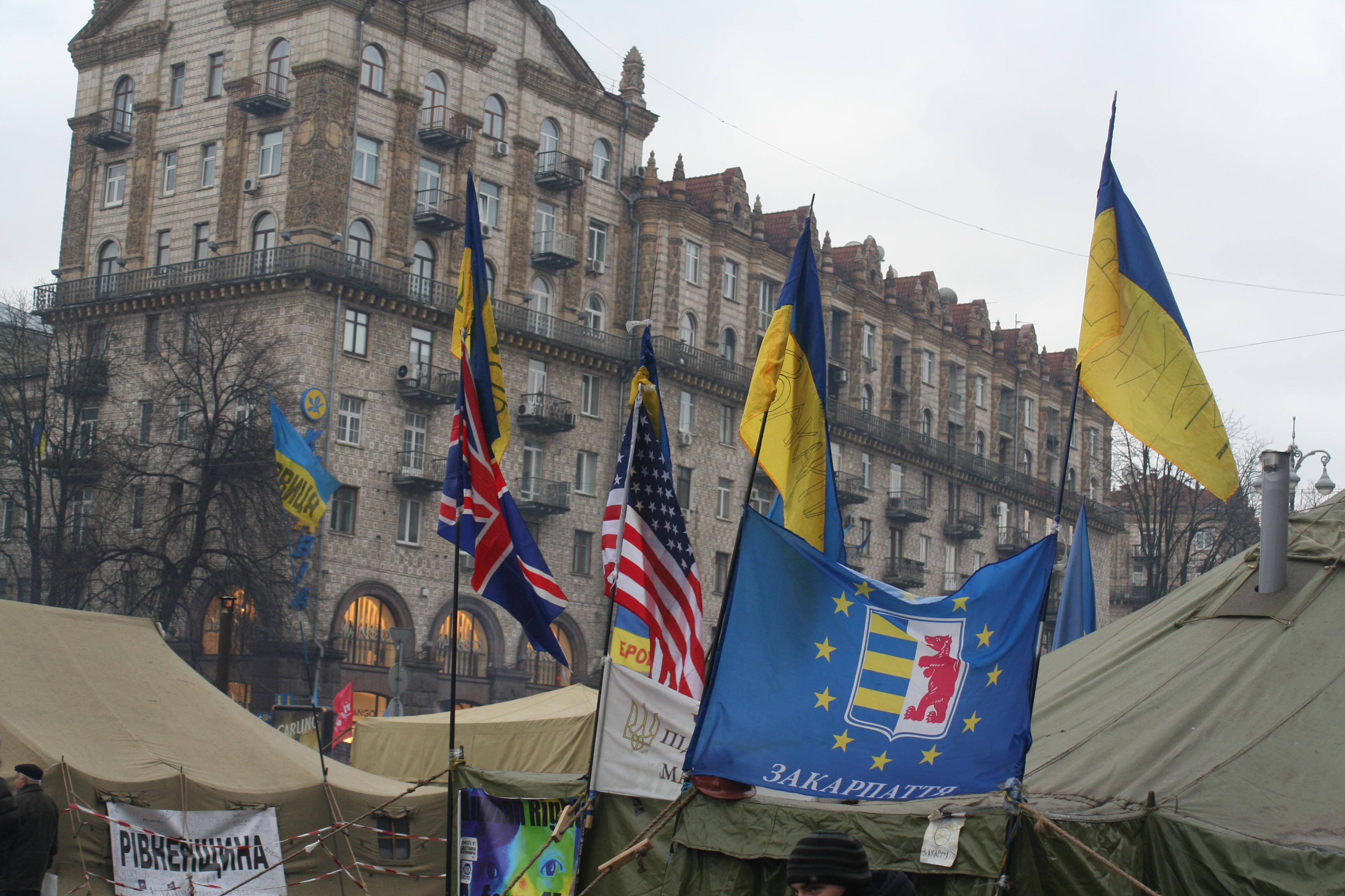 Euromajdan